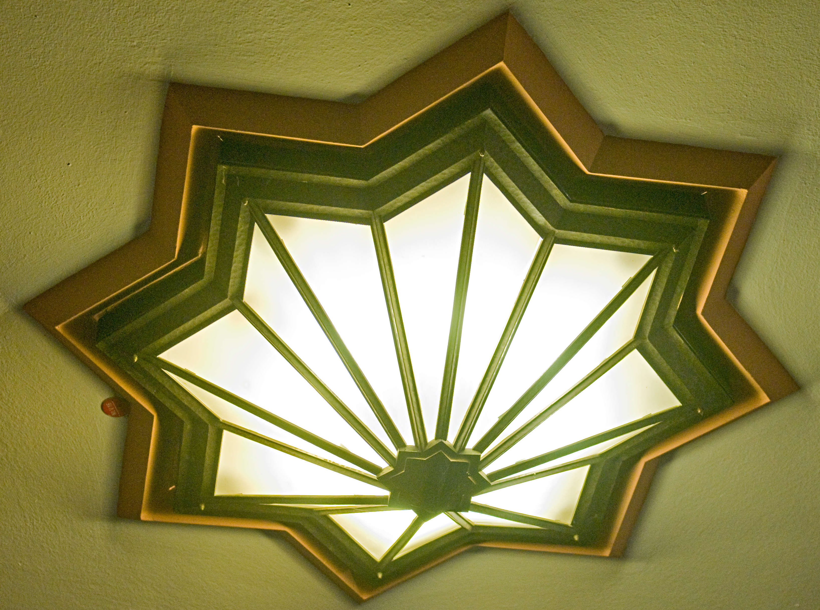 Industriepark HöchstBehrensbau: Achtsternige Deckenleuchte